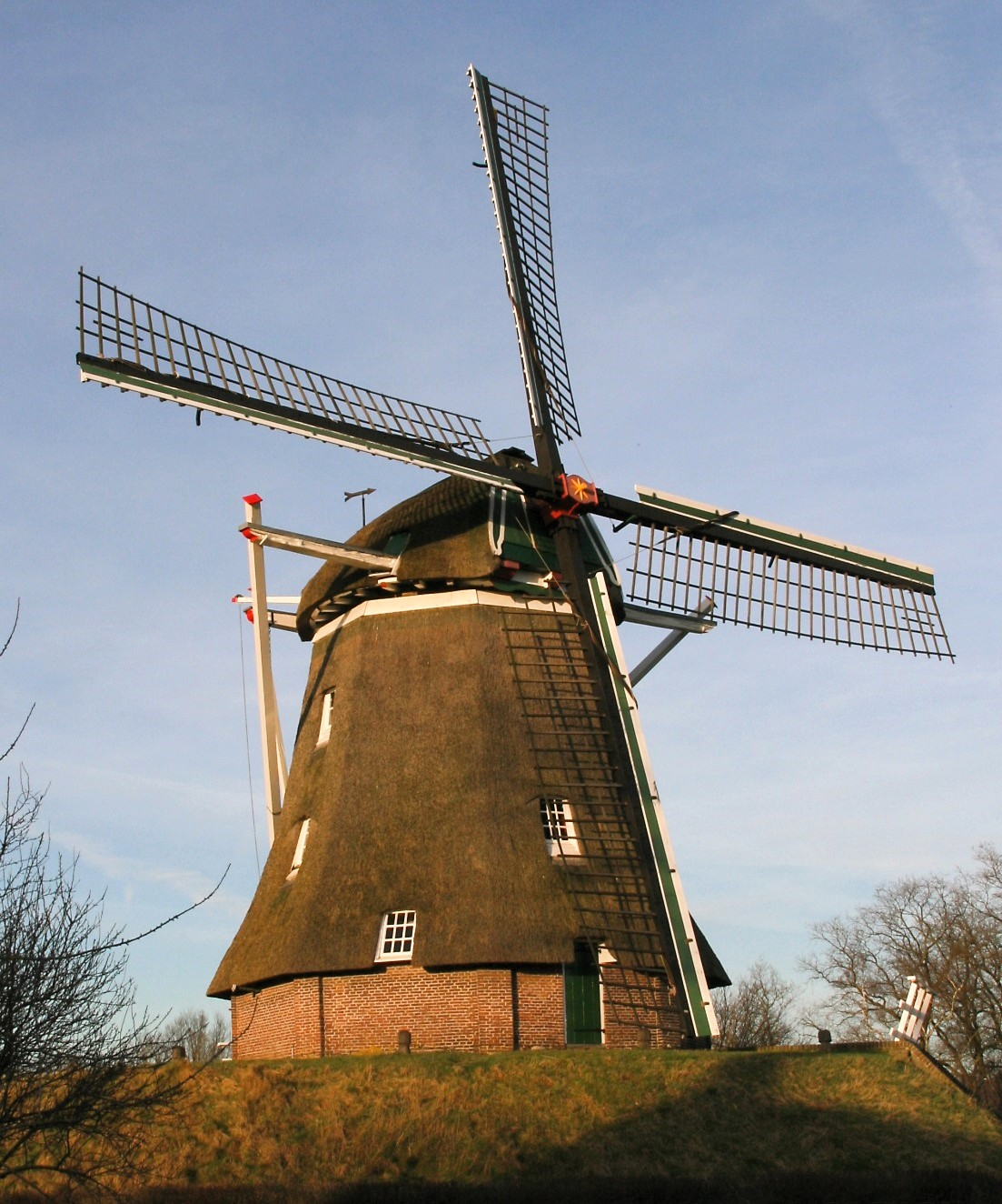 Ane: Anermolen, gezien vanuit het ZW